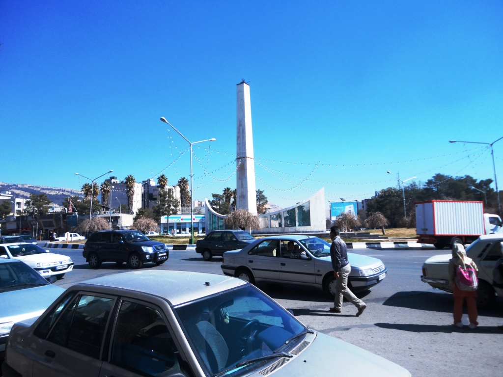 میدان گاز